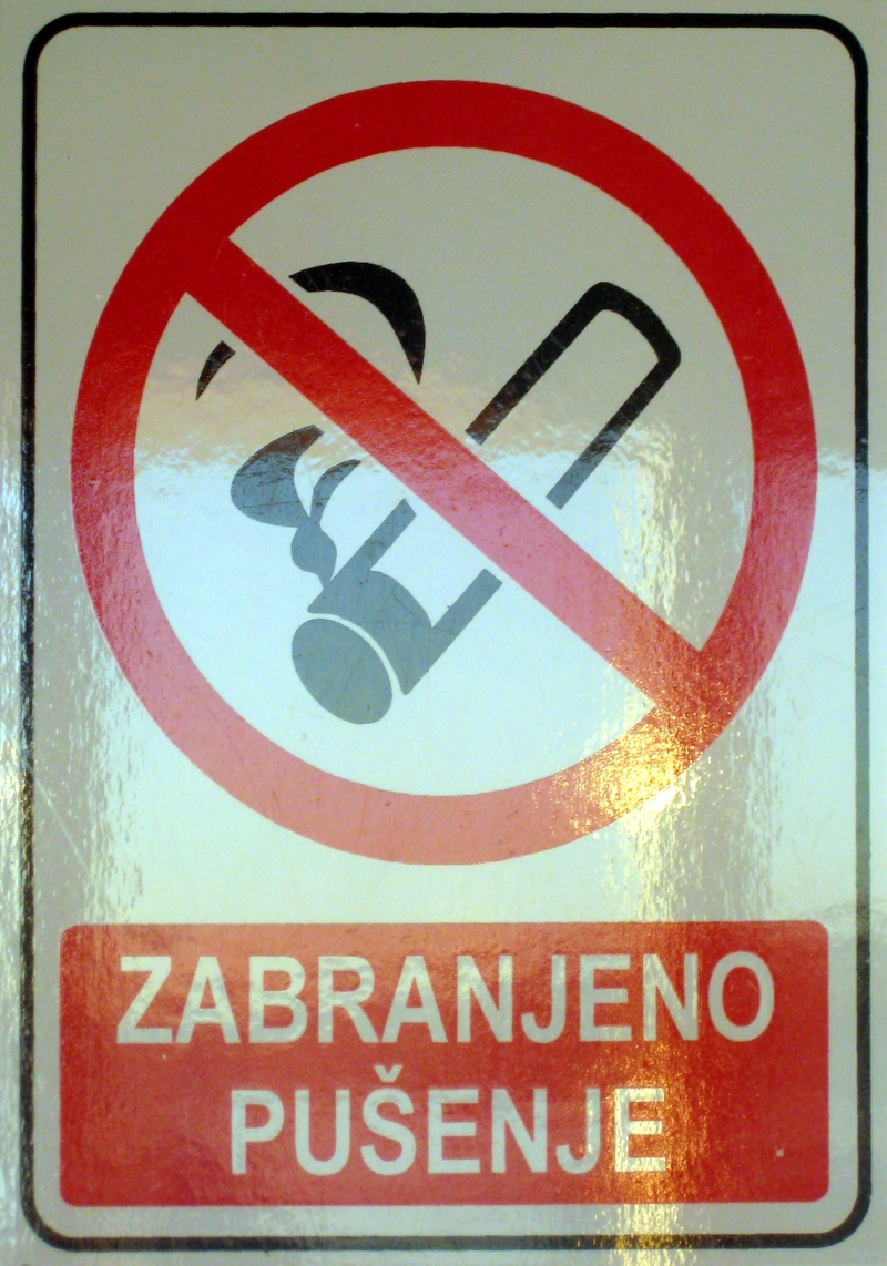 Natpis upozorenja u Hrvatskoj u 2008. godini